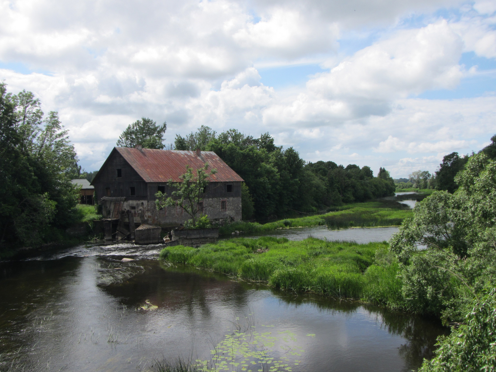 Suurejõe vesiveski Pärnu jõel